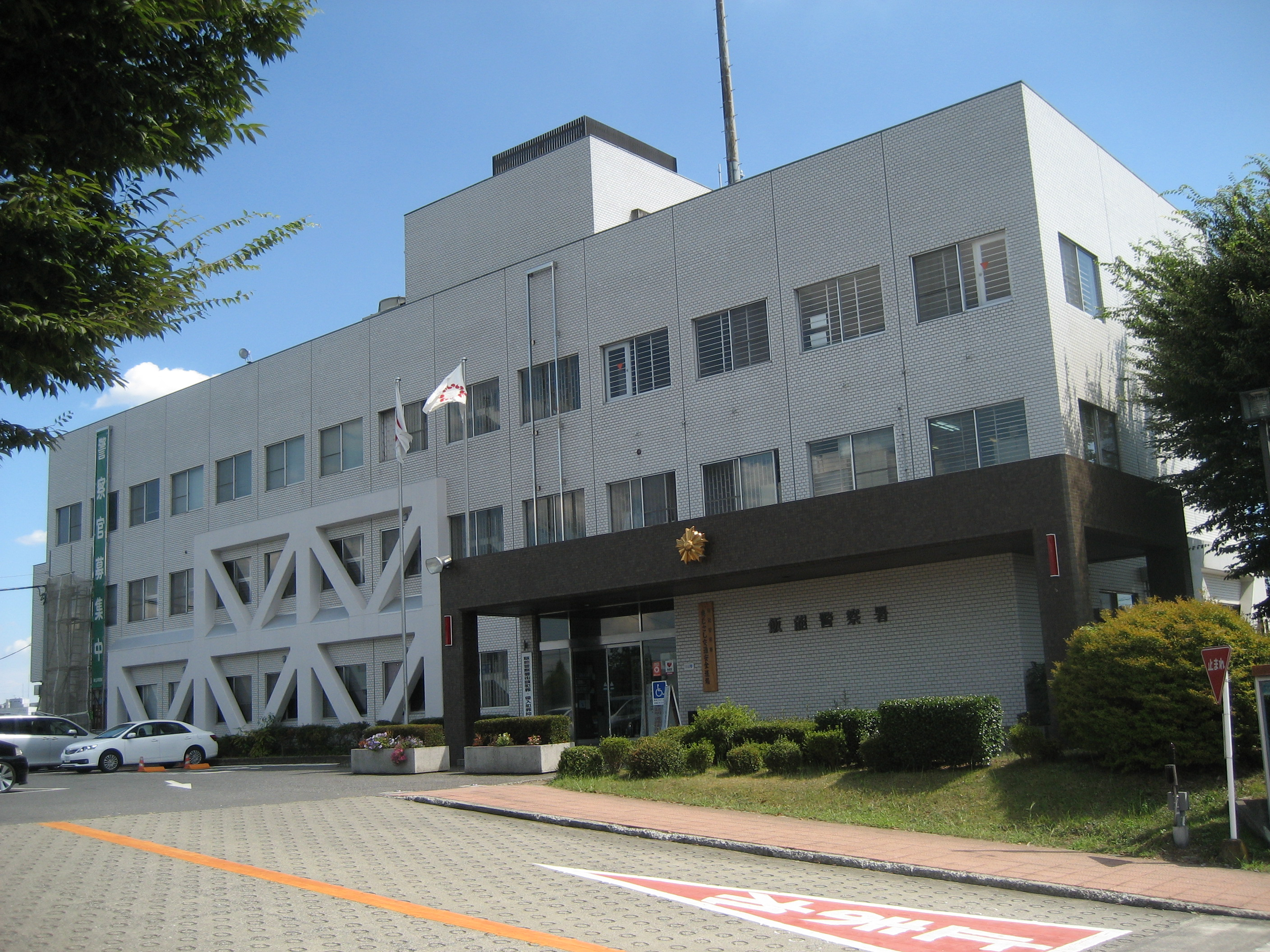 埼玉県飯能警察署庁舎